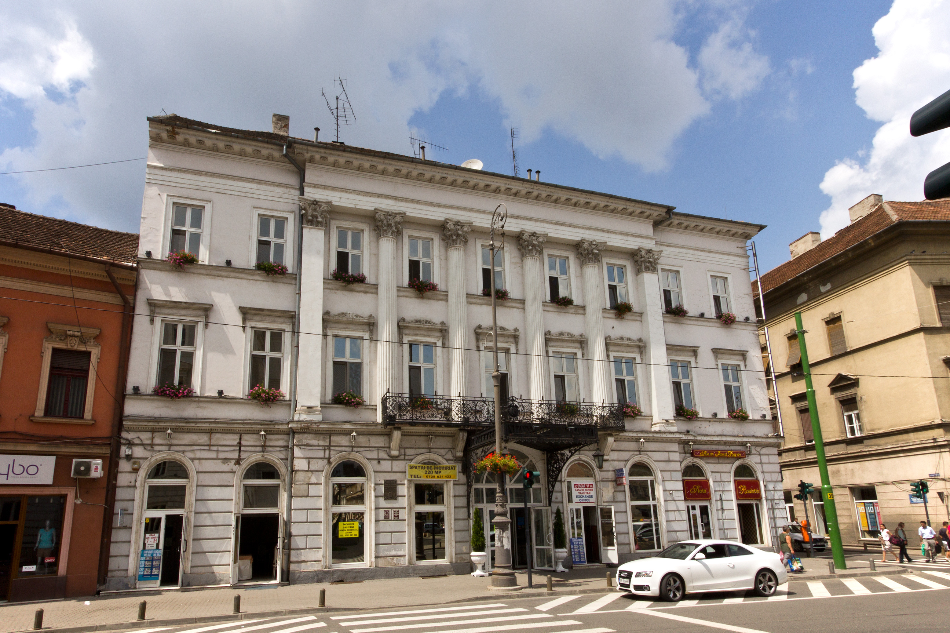 Hotel Ardealul (auch Hotel zum Weißen Kreuz, rumänisch Hotelul Crucea Albă), denkmalgeschütztes Gebäude im I. Bezirk Centru der Stadt Arad (Rumänien. Es befindet sich direkt neben dem Staatstheater. Original: Revoluției nr. 98 municiuiul ARAD 02B0079